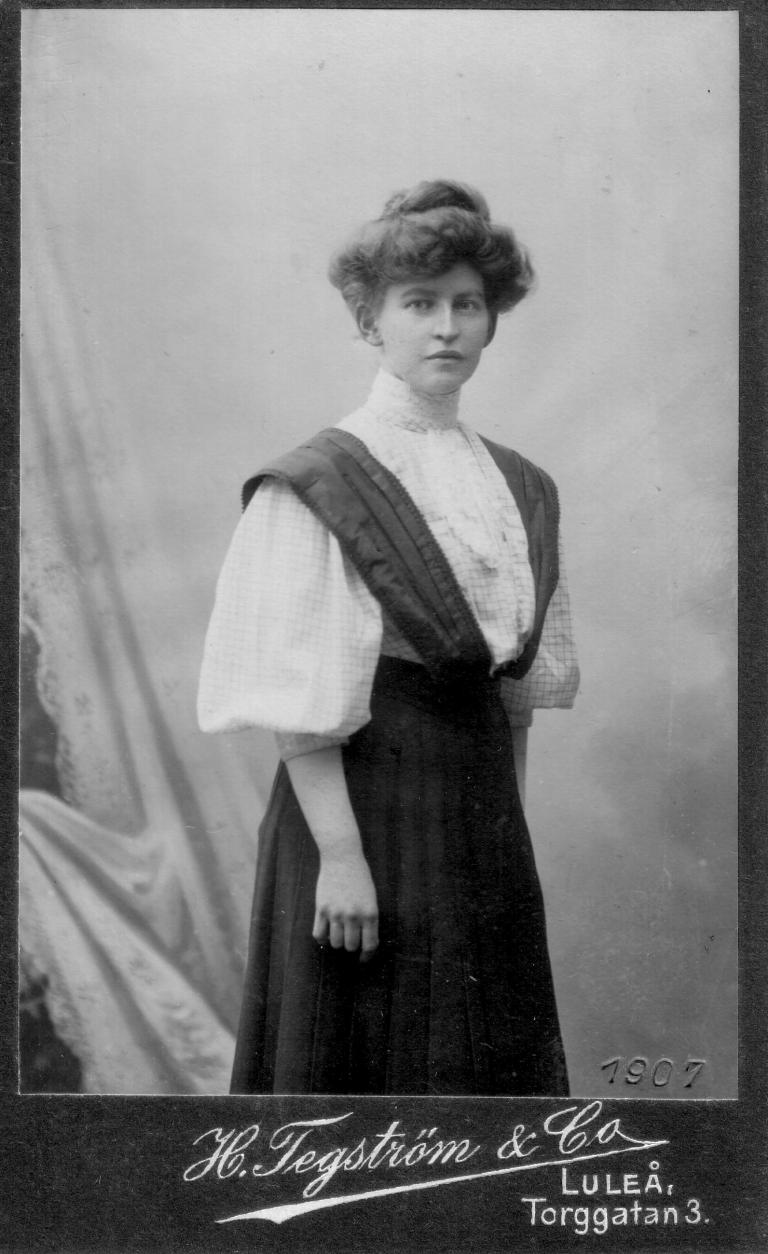 Svart-vitt porträtt av Märta Bucht som 25-åring.